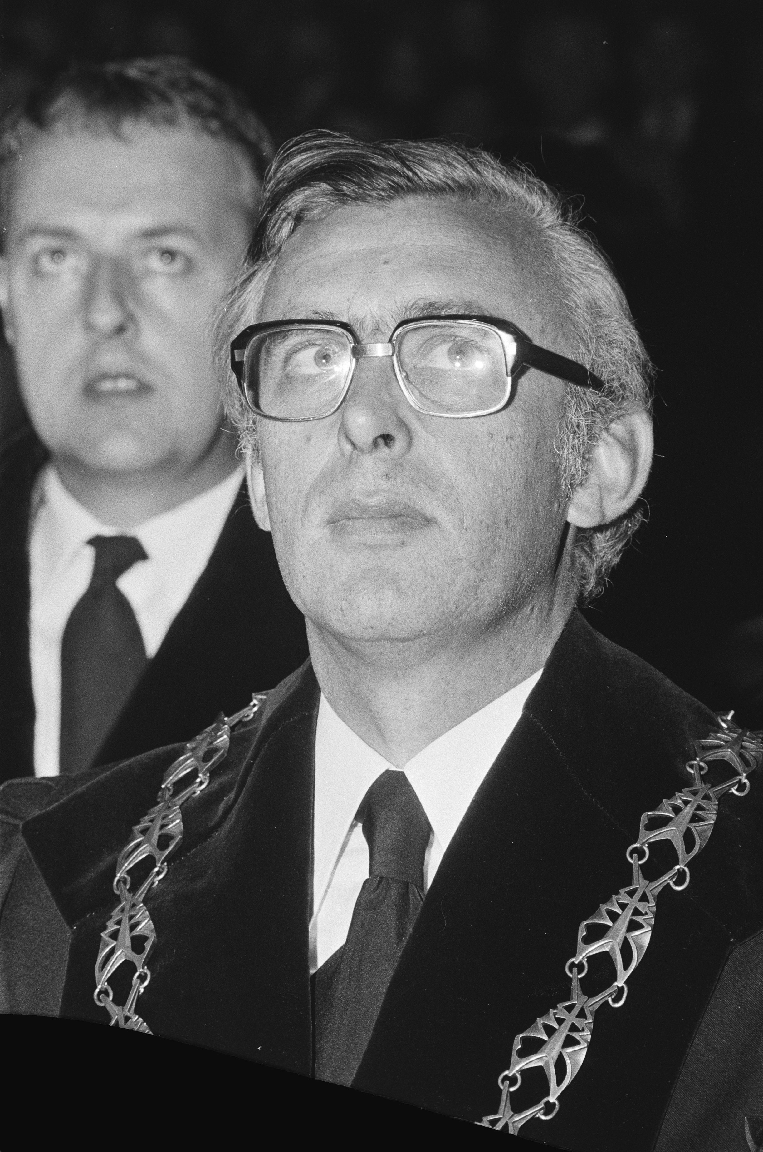 Collectie / Archief : Fotocollectie Anefo Reportage / Serie : [ onbekend ] Beschrijving : Opening academisch jaar in de VU; rector magnificus dr. D. M. Schenkeveld (kop) Datum : 4 september 1978 Trefwoorden : Openingen Fotograaf : Verhoeff, Bert / Anefo Auteursrechthebbende : Nationaal Archief Materiaalsoort : Negatief (zwart/wit) Nummer archiefinventaris : bekijk toegang 2.24.01.05 Bestanddeelnummer : 929-8846